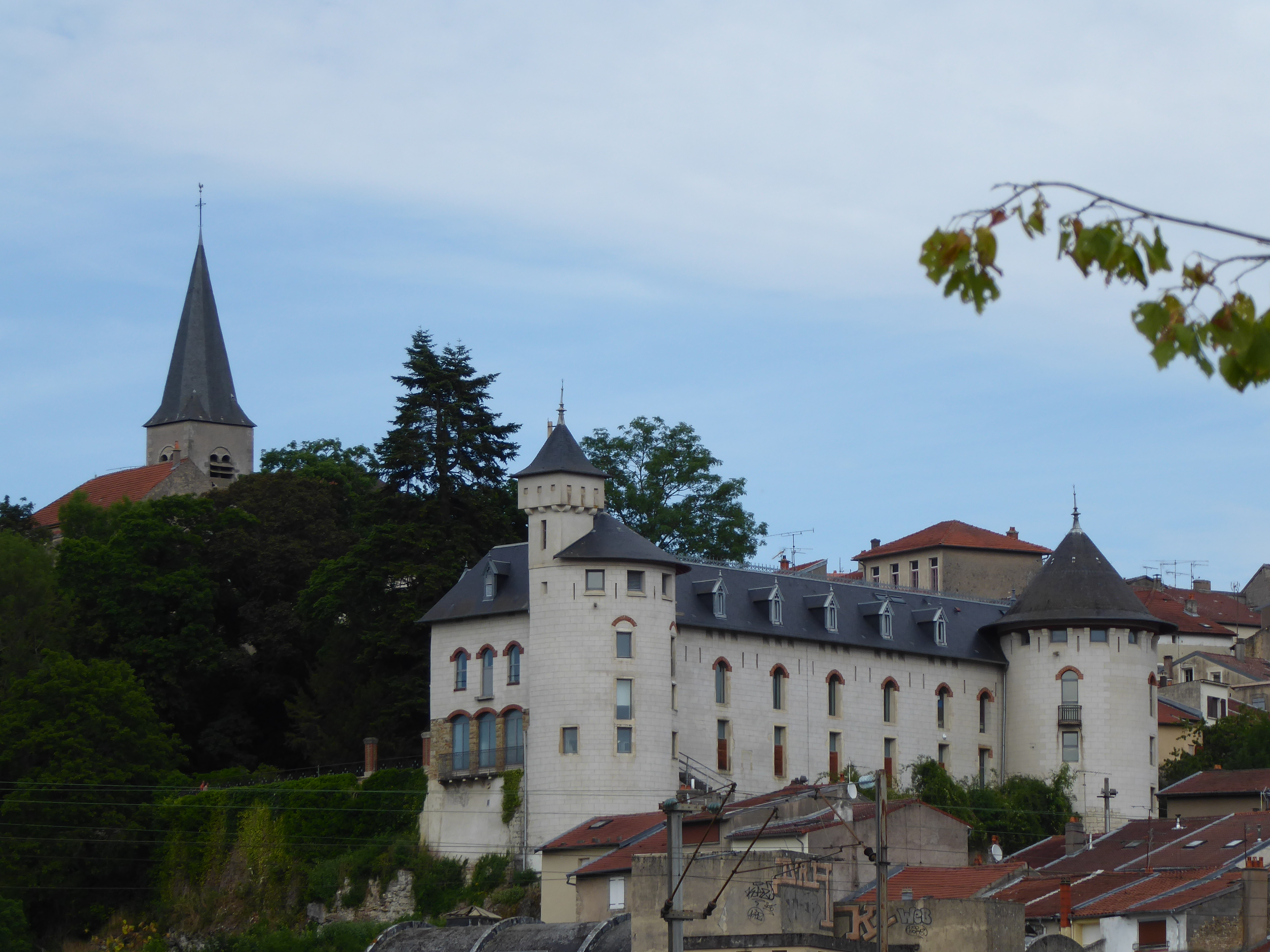 Château Corbin (Liverdun) vu du sud-ouest, depuis la rive de la Moselle en contrebas.